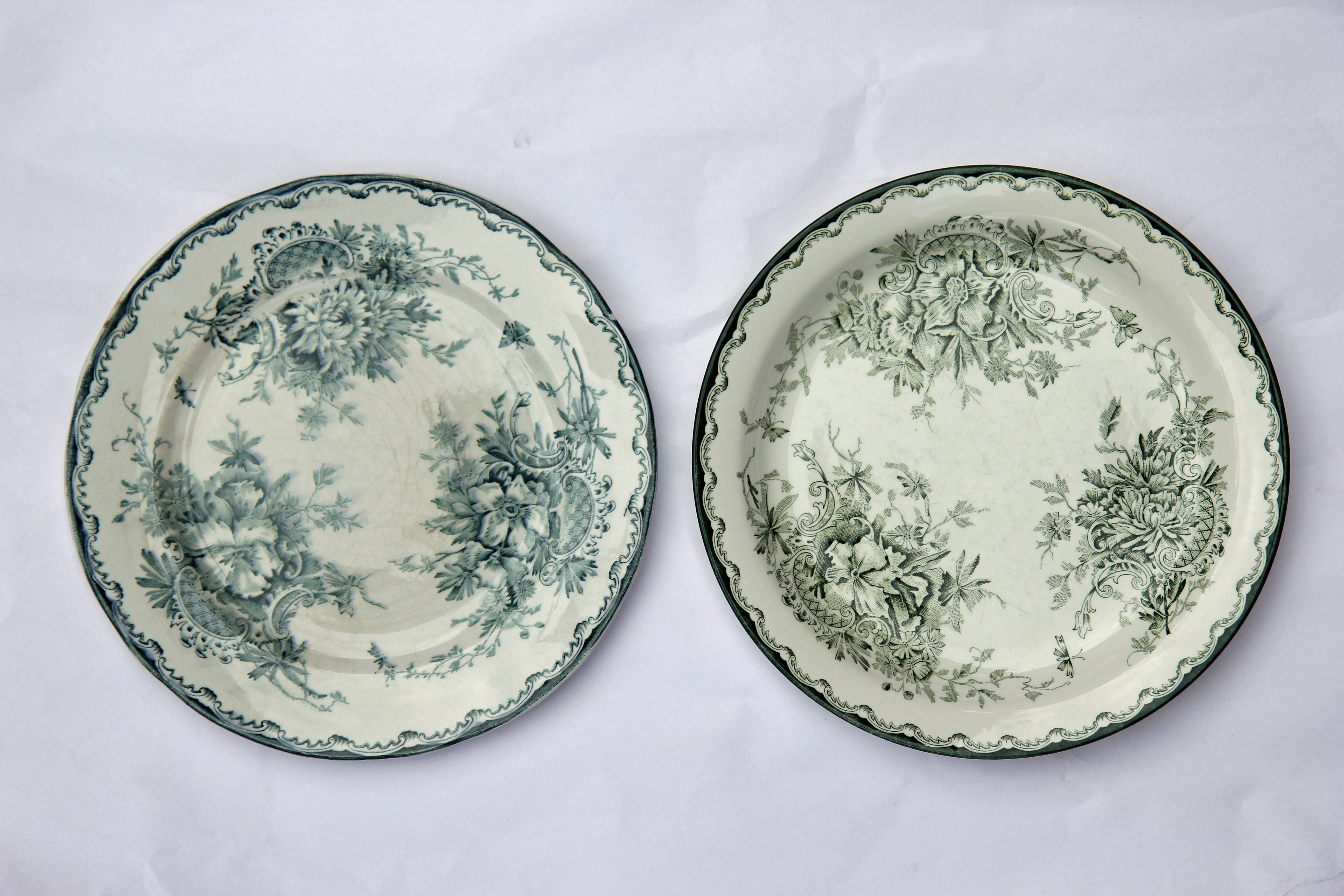 Grön Anna äldre och nyare generation